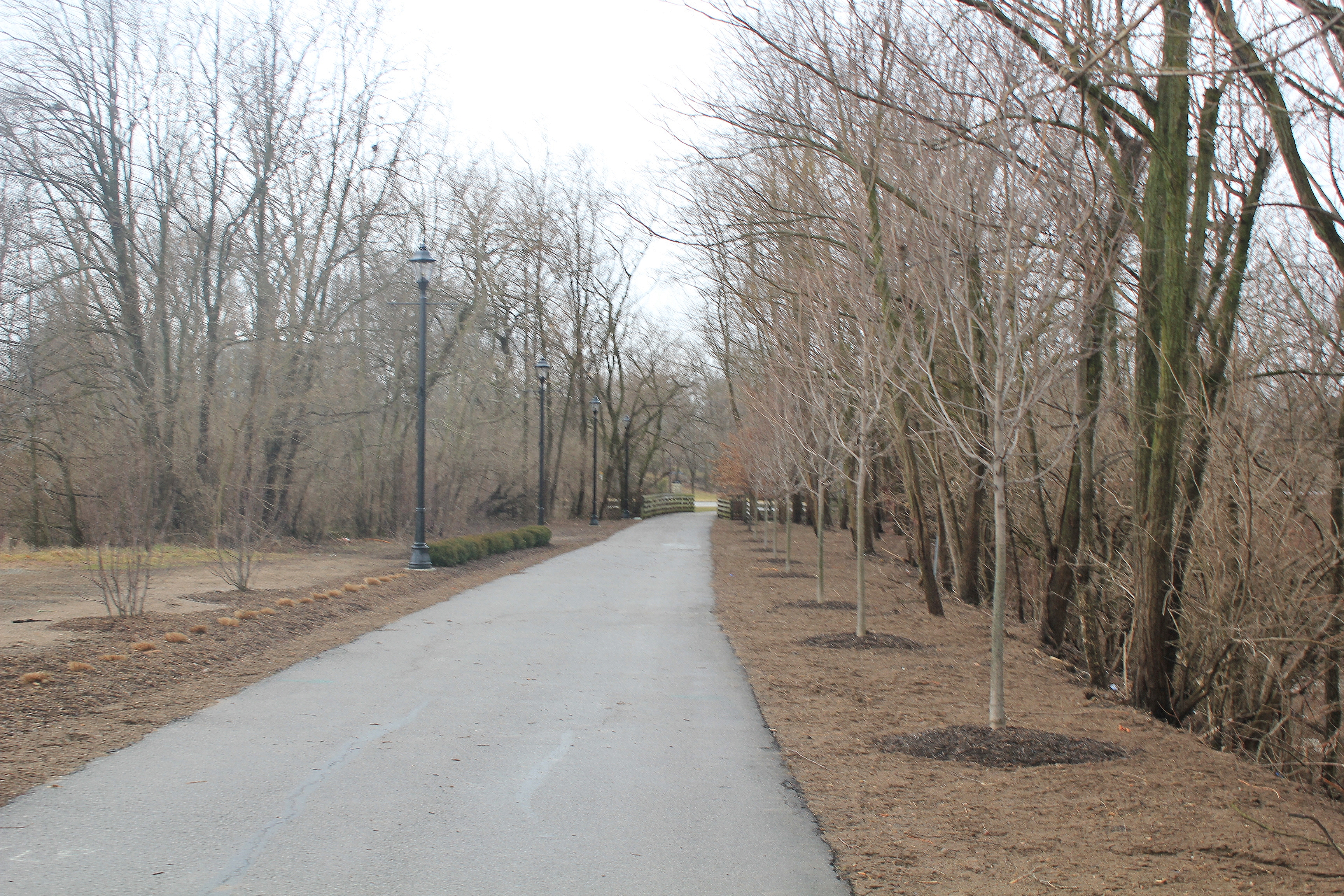 Little Miami Scenic Trail, Xenia, Ohio.